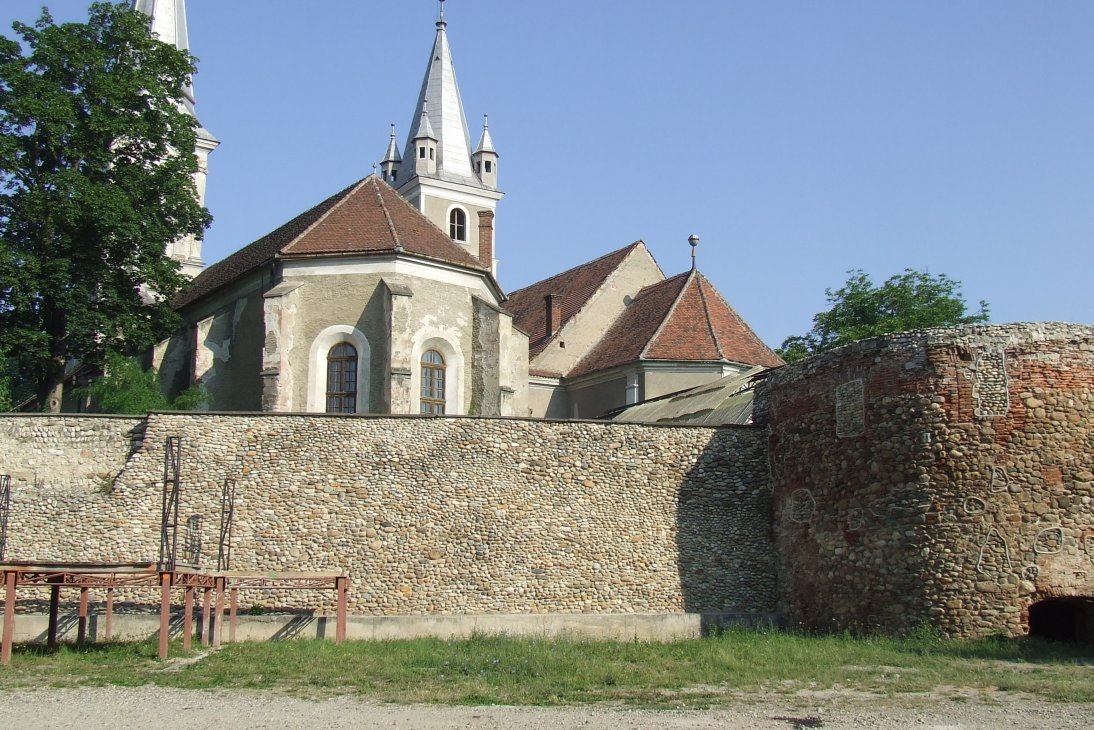 Image from Orăştie, Romania - Orăştie Citadel